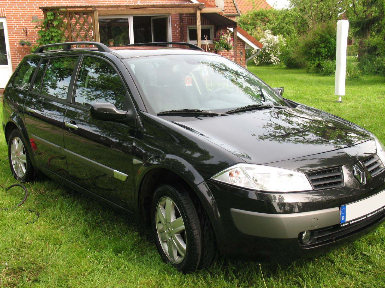 Front des Renault Megane Grantour